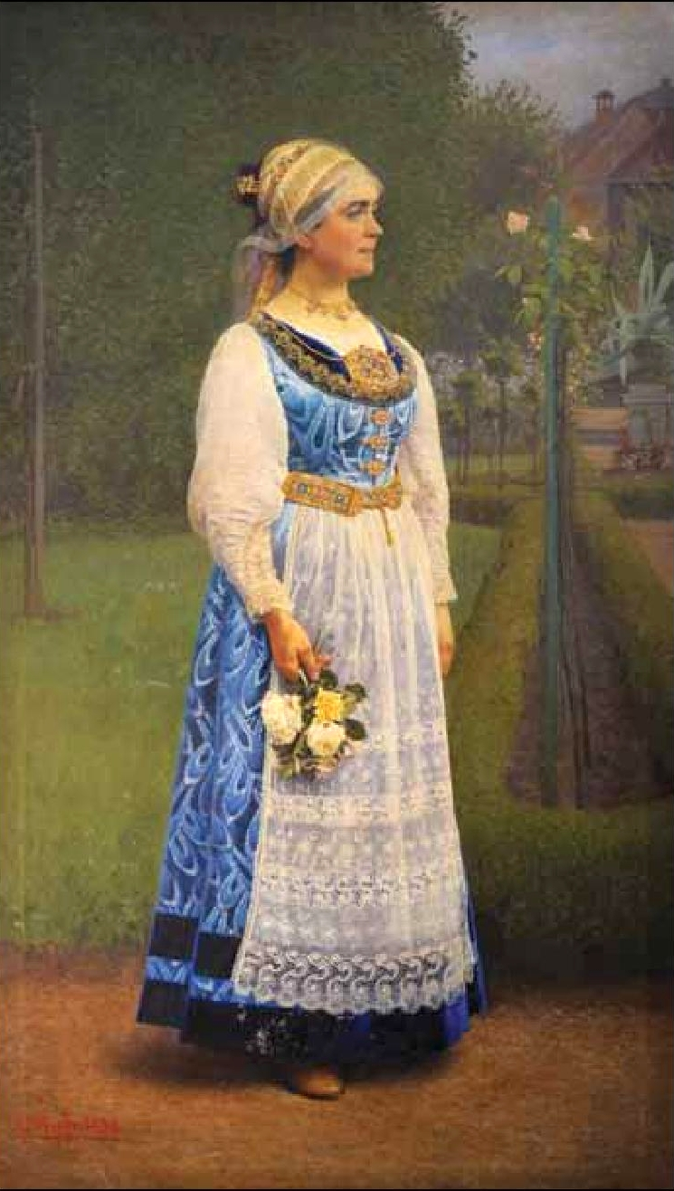 Friedrich Miess - Portret de femeie in port sasesc